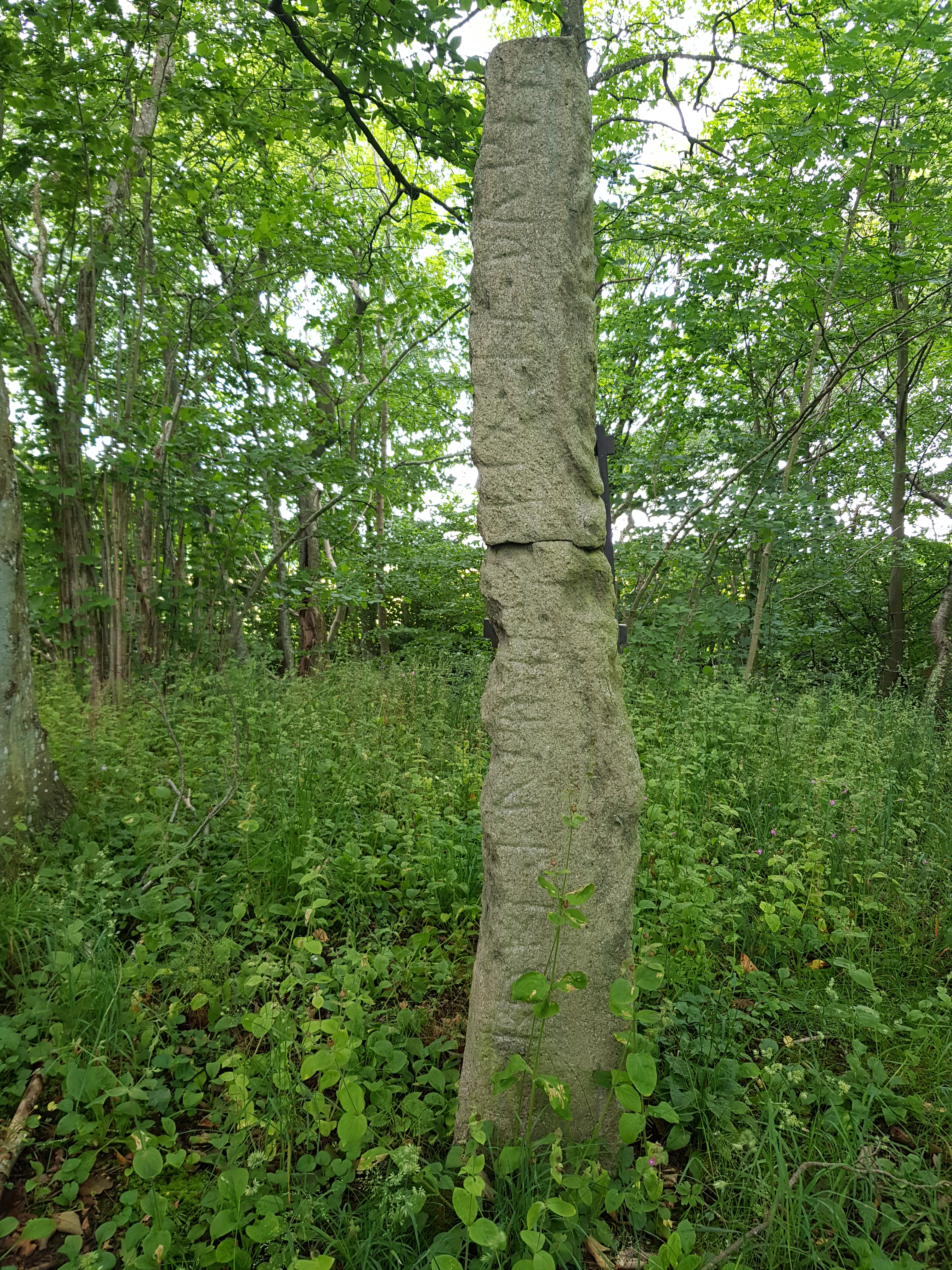 Brohusstenen (Runenstein), Standort: in einem kleinen Hain am Lyrsbyvej bei Brohuse, Bornholm. Auch unter dem Namen "Østermarie-Stein 4" bekannt.